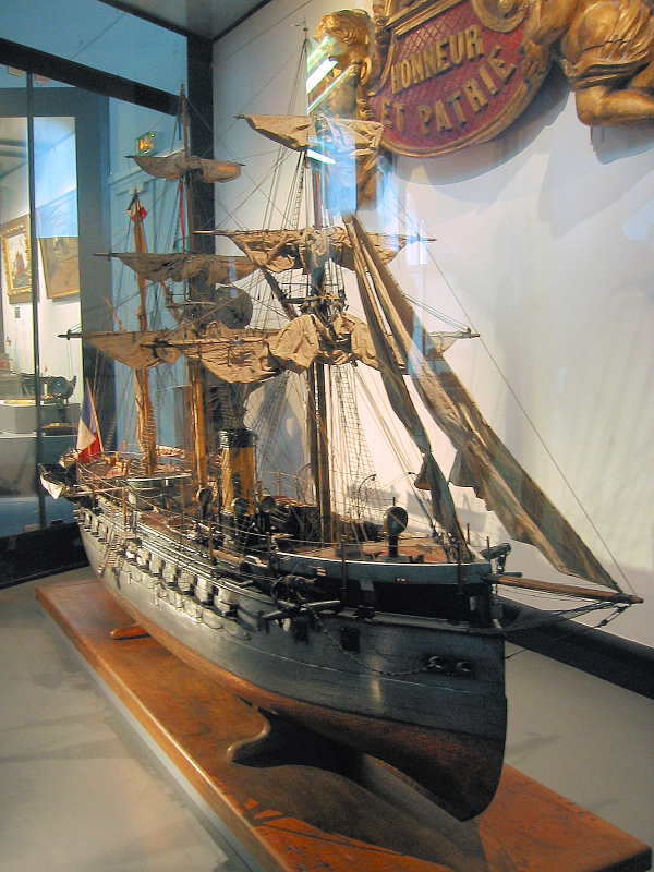 Model of La Gloire. Musee de la Marine. Personal photograph 2006.